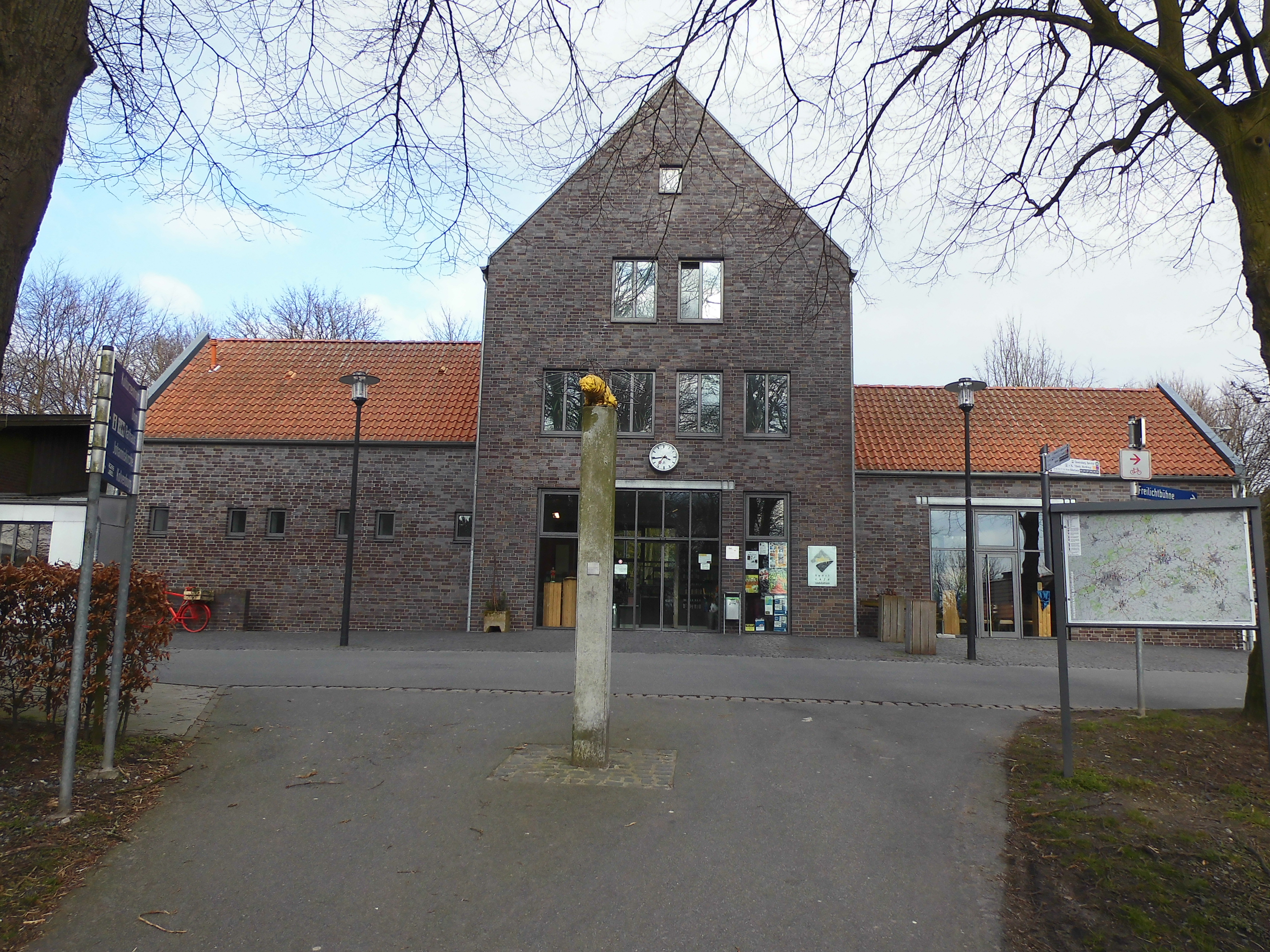 billerbecks BAHNHOF nach der Neuerrichtung im Jahr 2004